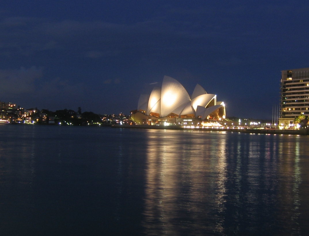 Opera Sydney.